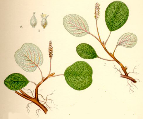 Nätvide (Salix reticulata)